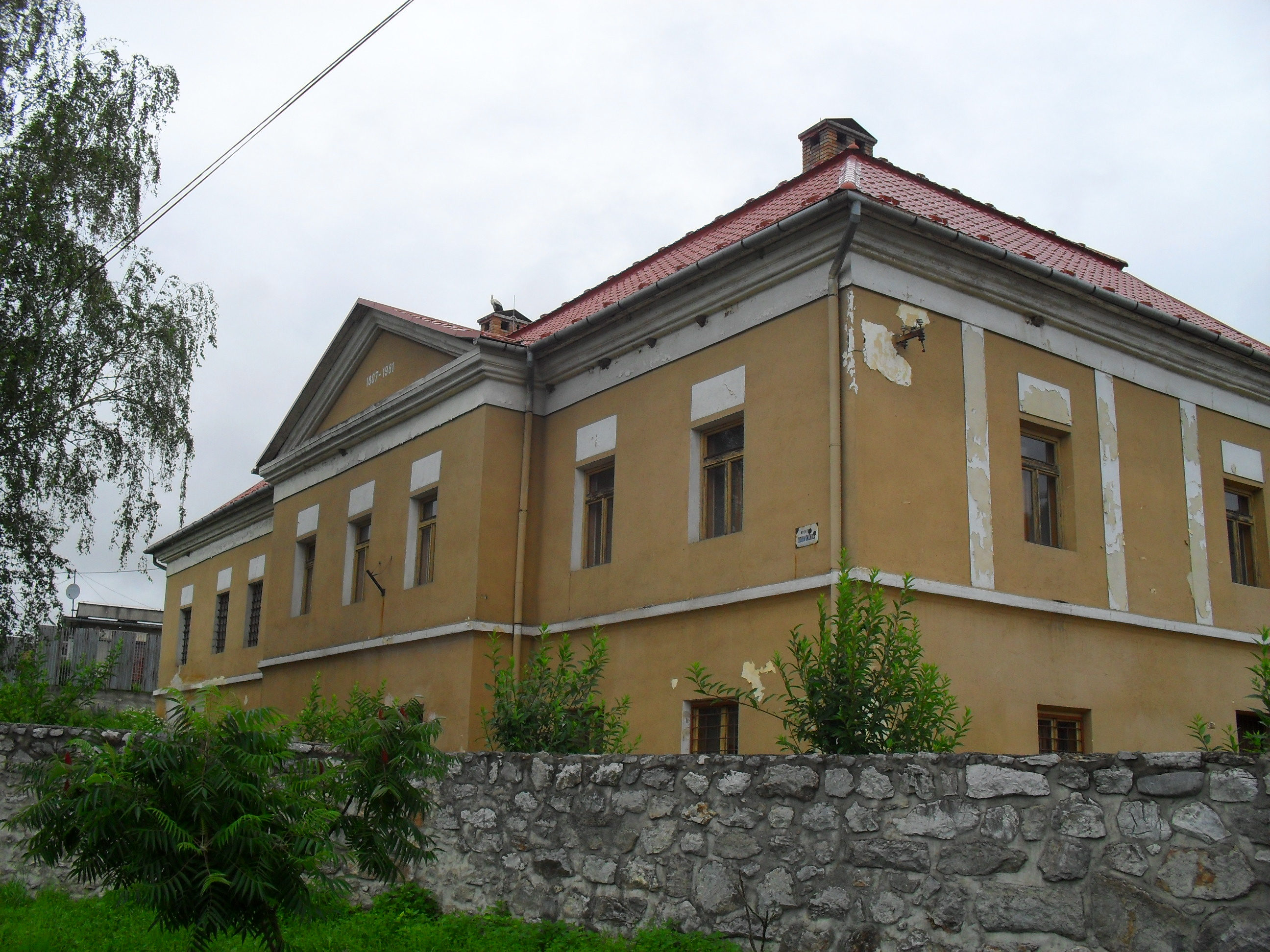 Gice - kastély This medium shows the protected monument with the number 608-498/1 in the Slovak Republic.